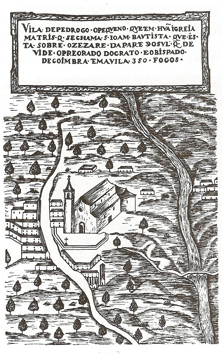 Pedrogão Pequeno